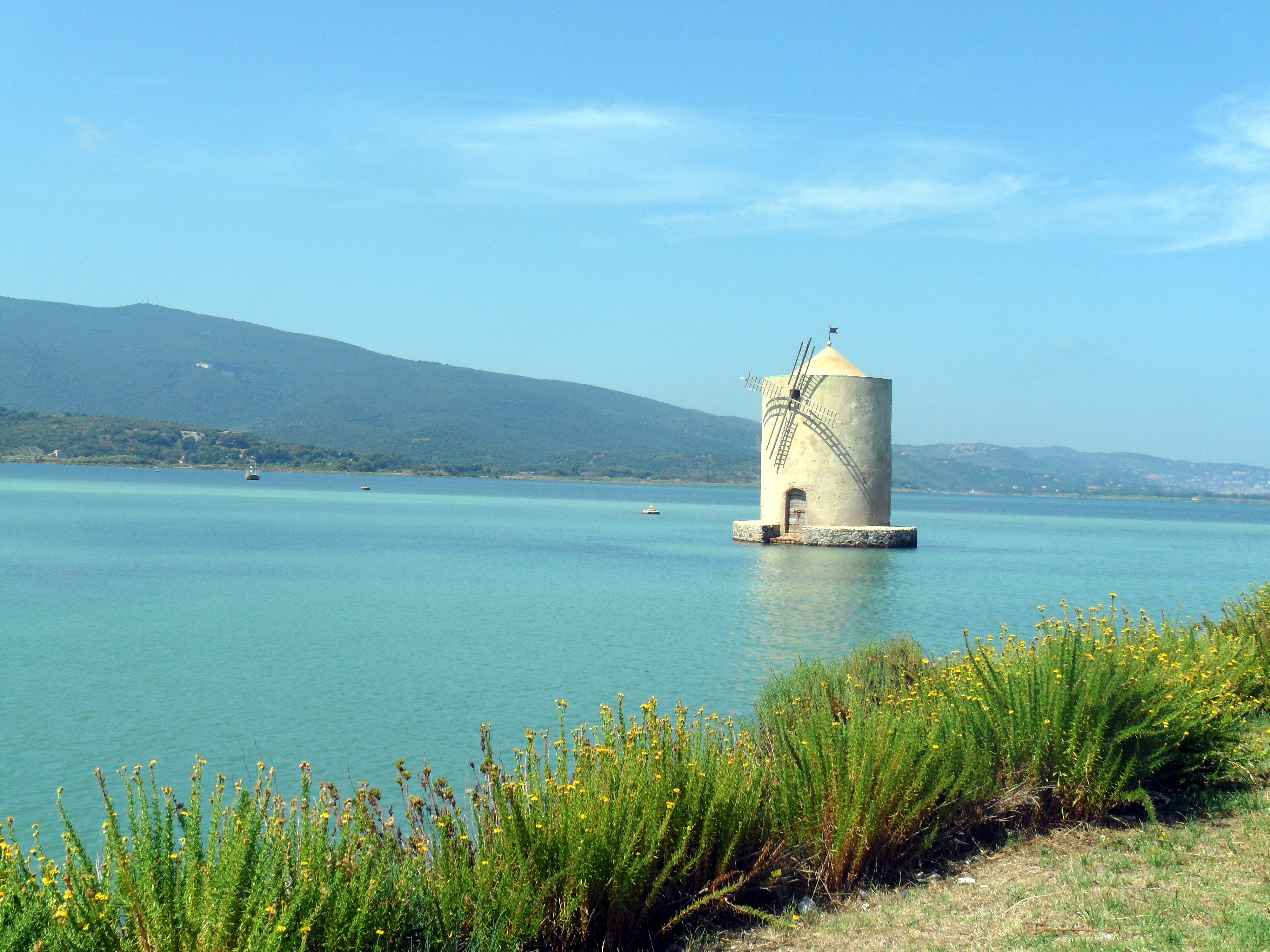 Riserva naturale Laguna di Orbetello di Ponente This is a photo of a monument which is part of cultural heritage of Italy. The authorisation for taking photos of this object was provided by the World Wide Fund for Nature Italy.